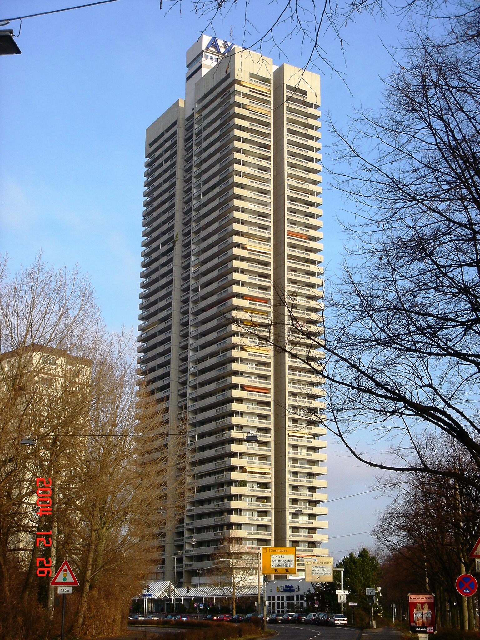 Colonia-Hochhaus in Köln-Riehl